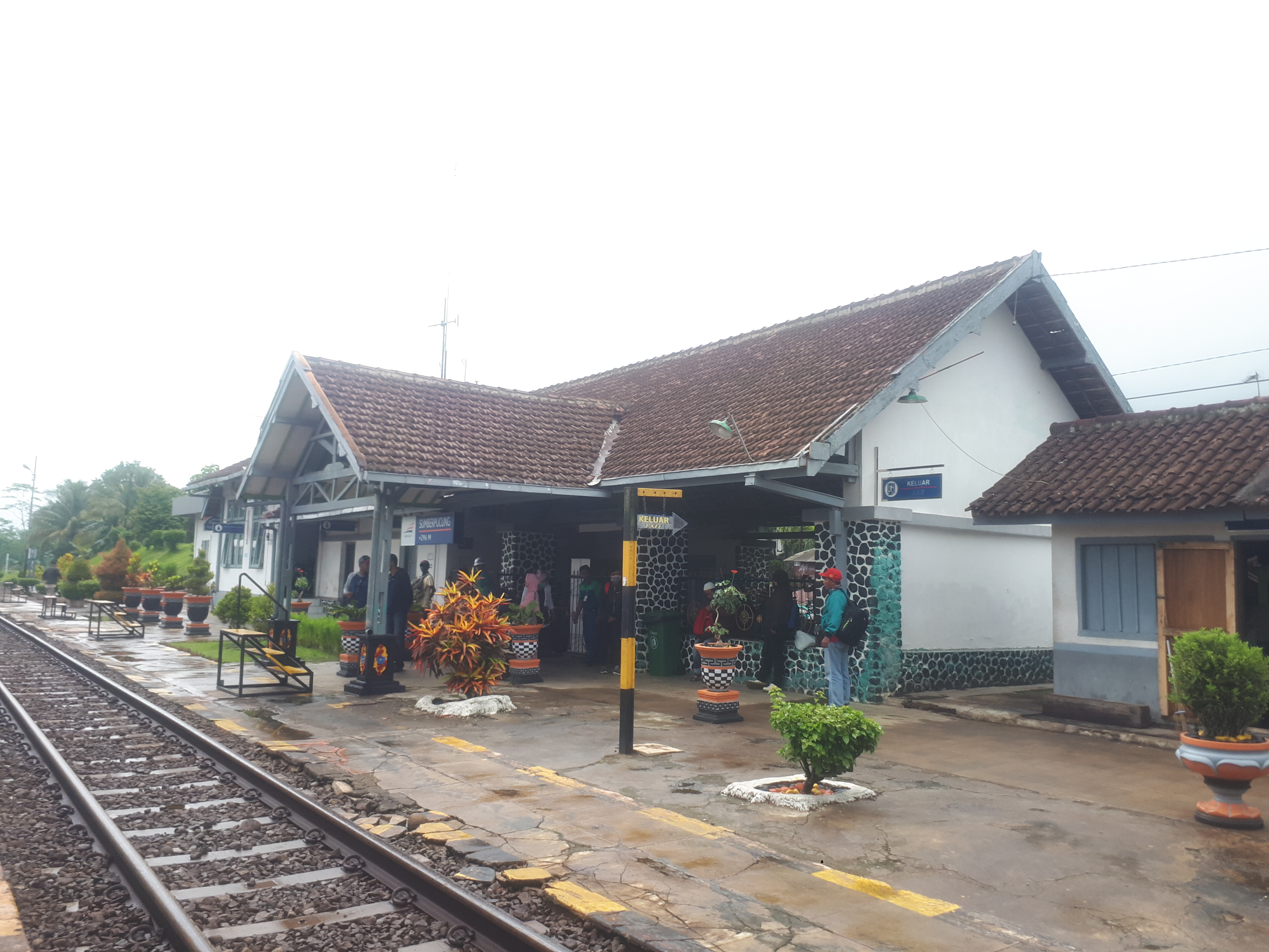 Stasiun Sumberpucung pada tahun 2020